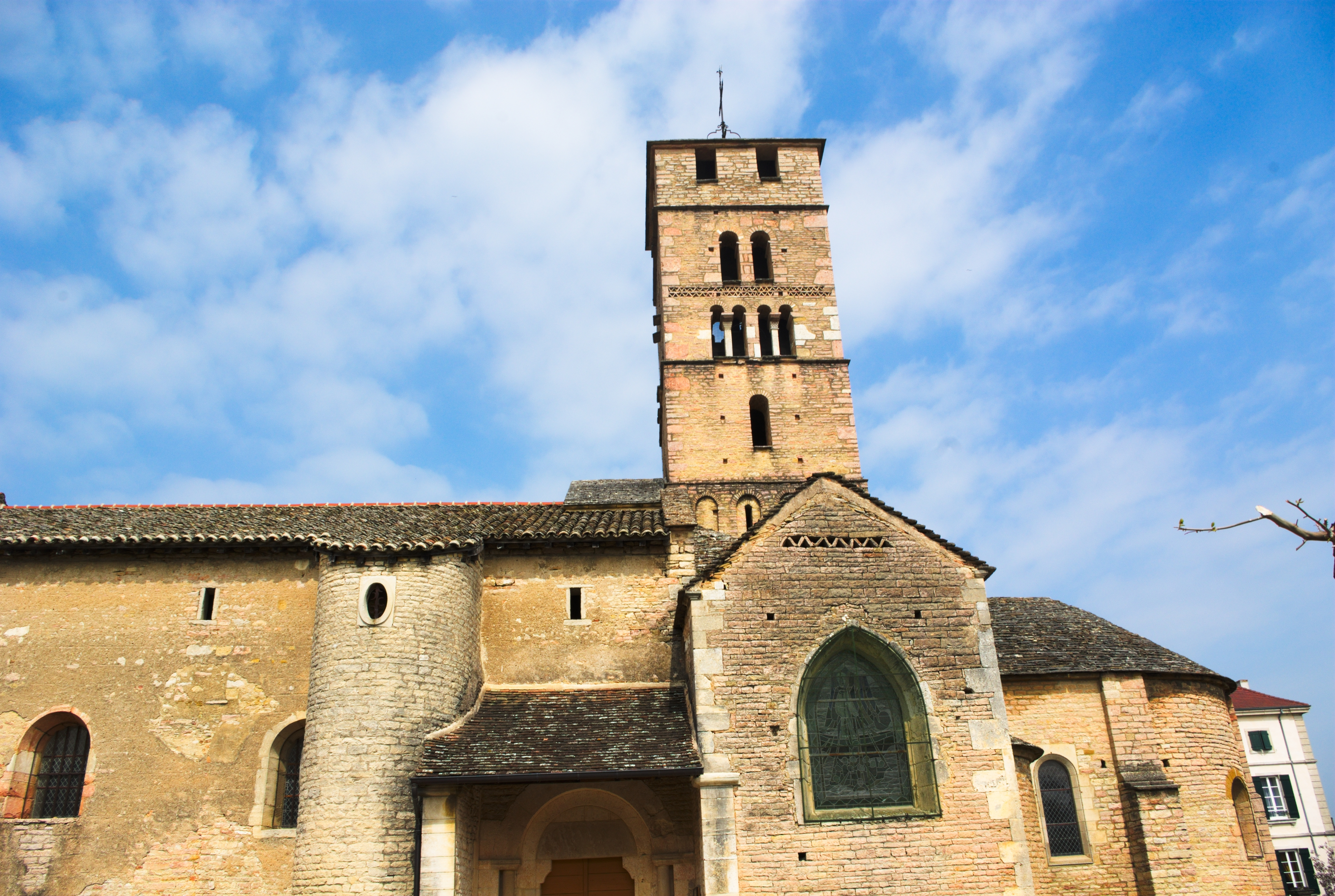 Église Saint-Pierre d'Uchizy